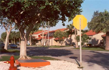 Dhahran Hills Dhahran Hills